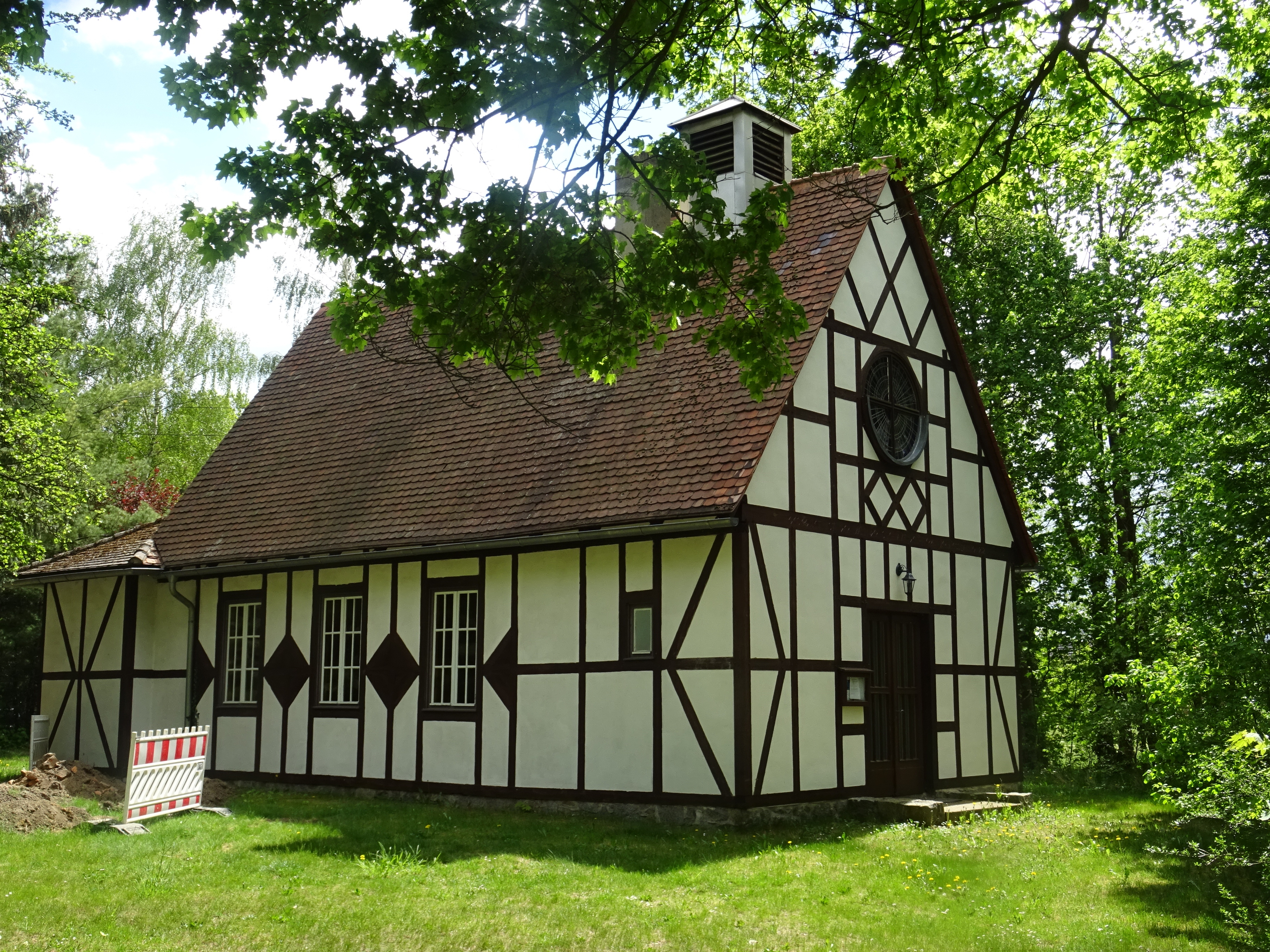 Bollensdorf, denkmalgeschützte Dorfkirche, 1952 erbaut. Blick von Nordwesten